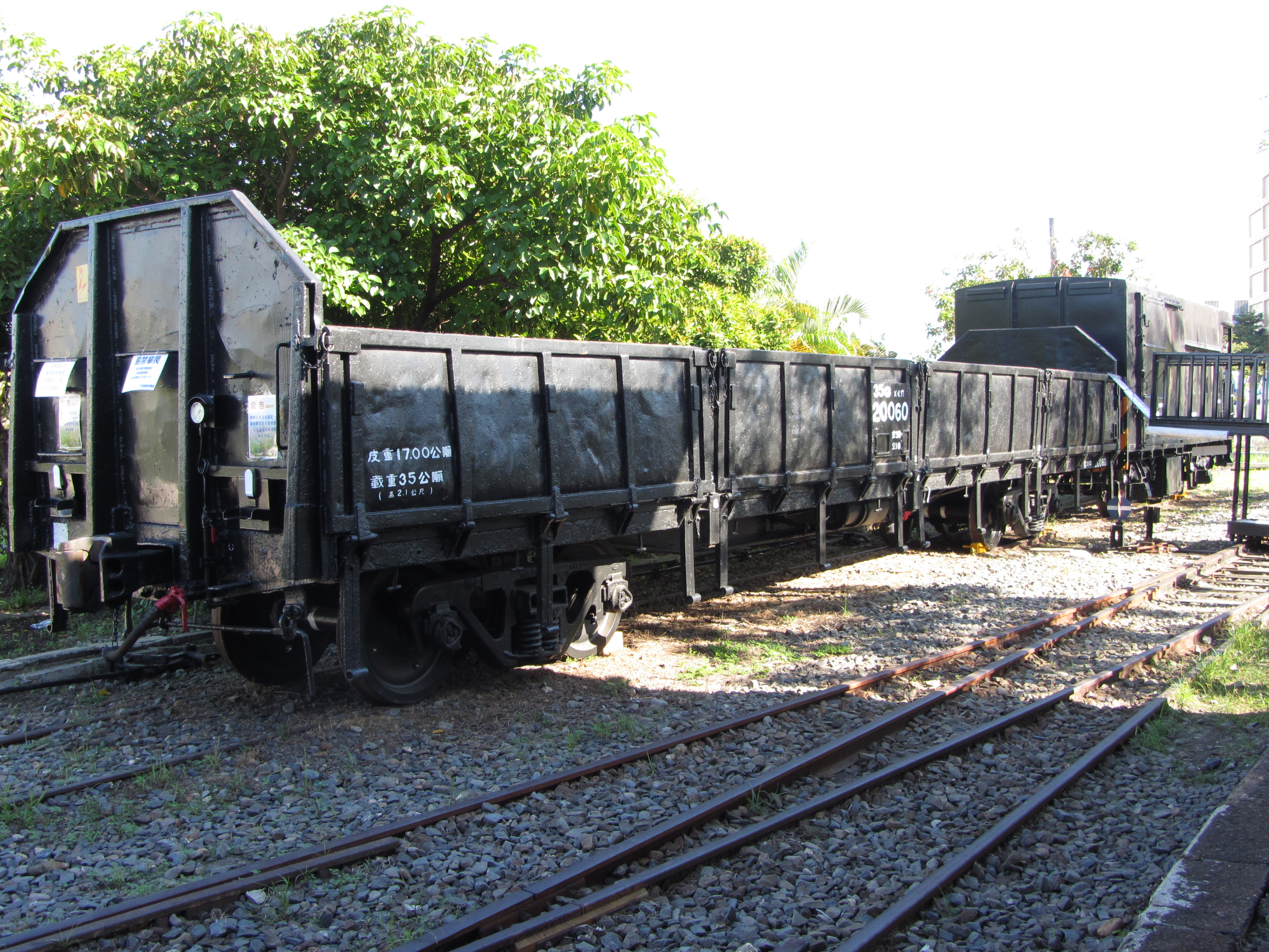 臺灣鐵路管理局敞車35G20060，現存打狗鐵道故事館。